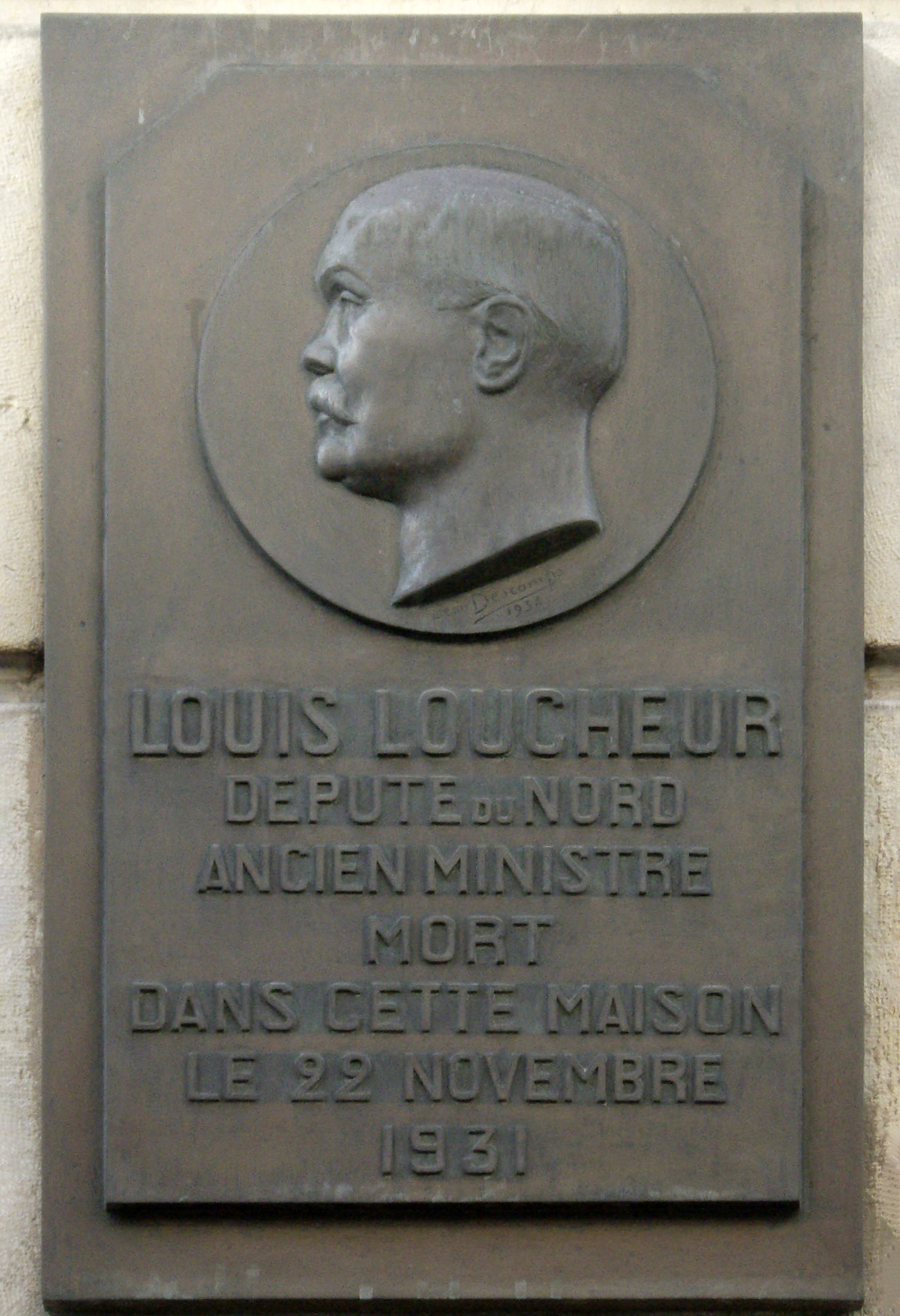 Plaque commémorative, 9 rue de l'Amiral-Hamelin, Paris 16e. « Louis Loucheur, député du Nord, ancien ministre, mort dans cette maison le 22 novembre 1931. »